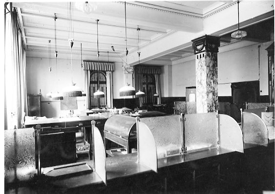 Innenraum der Lippischen Landesspar- und Leihekasse in Detmold